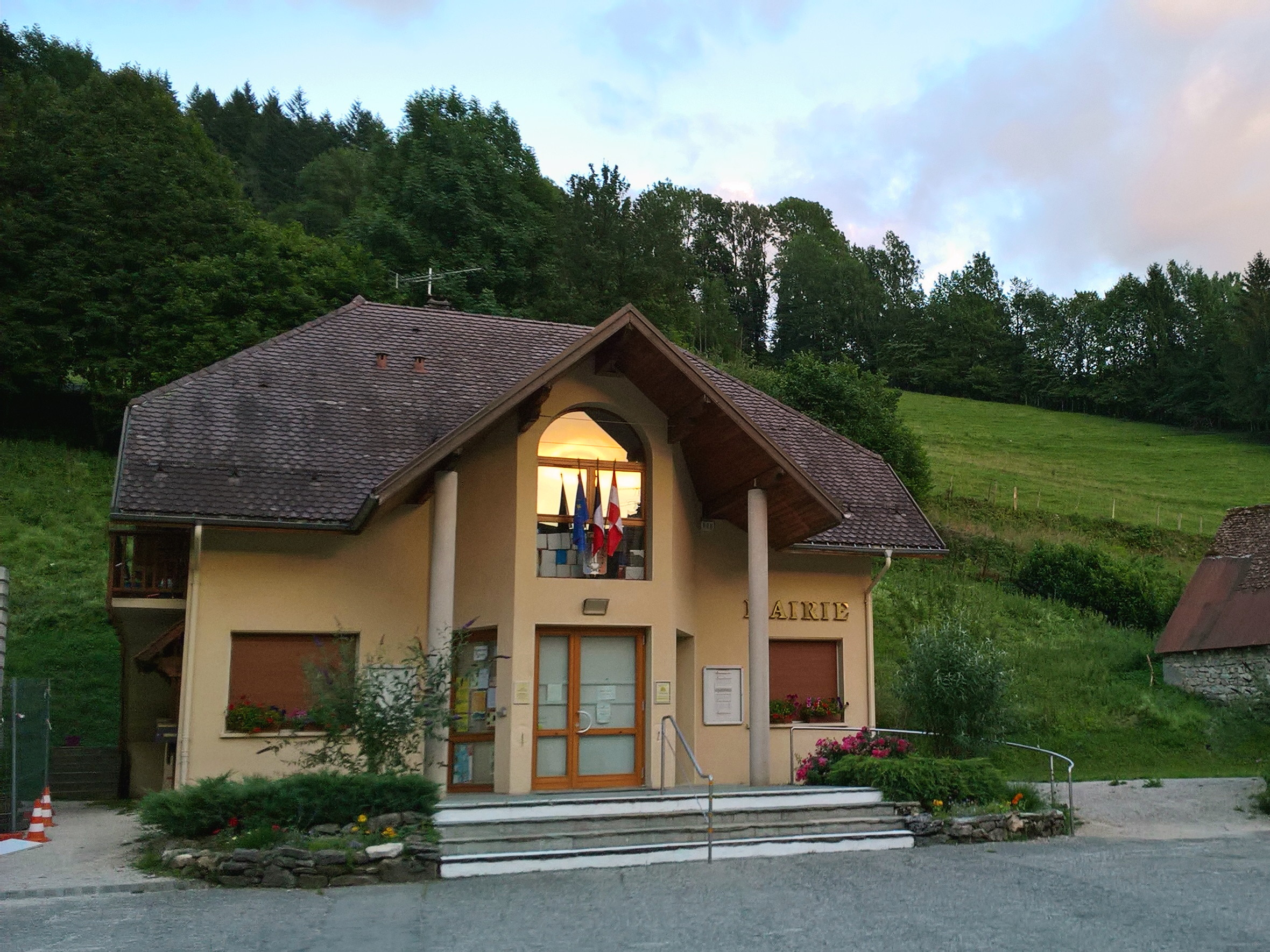 Saint-Pierre-d'Entremont (Savoie), mairie